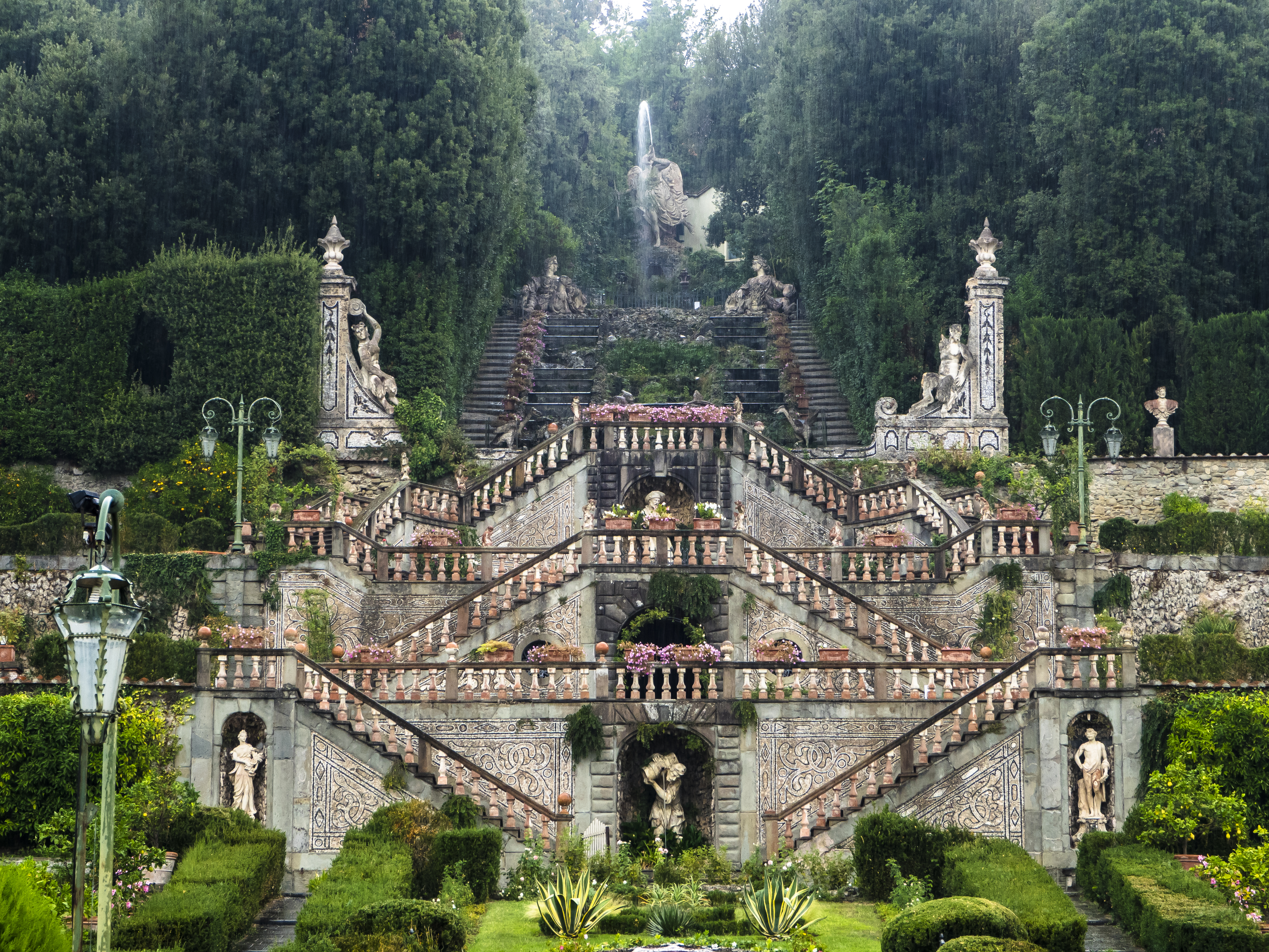 Giardino di Villa Garzoni This is a photo of a monument which is part of cultural heritage of Italy.